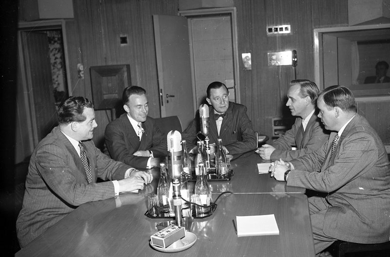 Högerledaren Jarl Hjalmarson valintervjuas i radio. Fr. v. Herbert Claesson (s), Holger Wigerz (fp), Hjalmarson, Knut Olsson (k) och Torsten Andersson (bf)